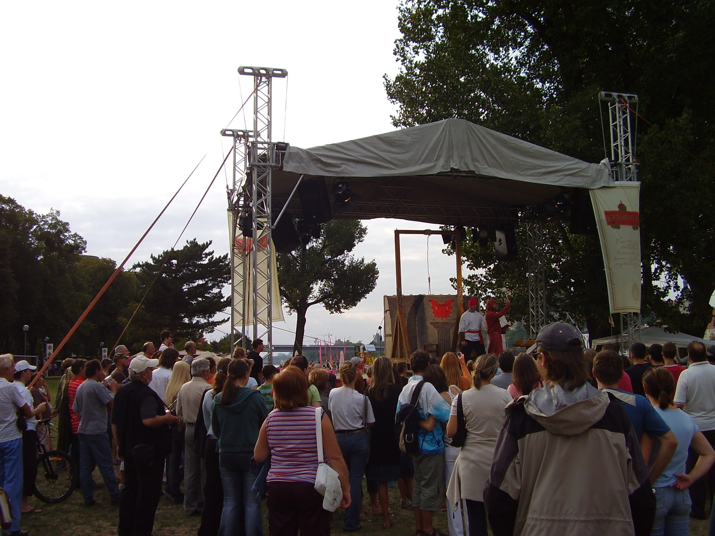 Bratislava